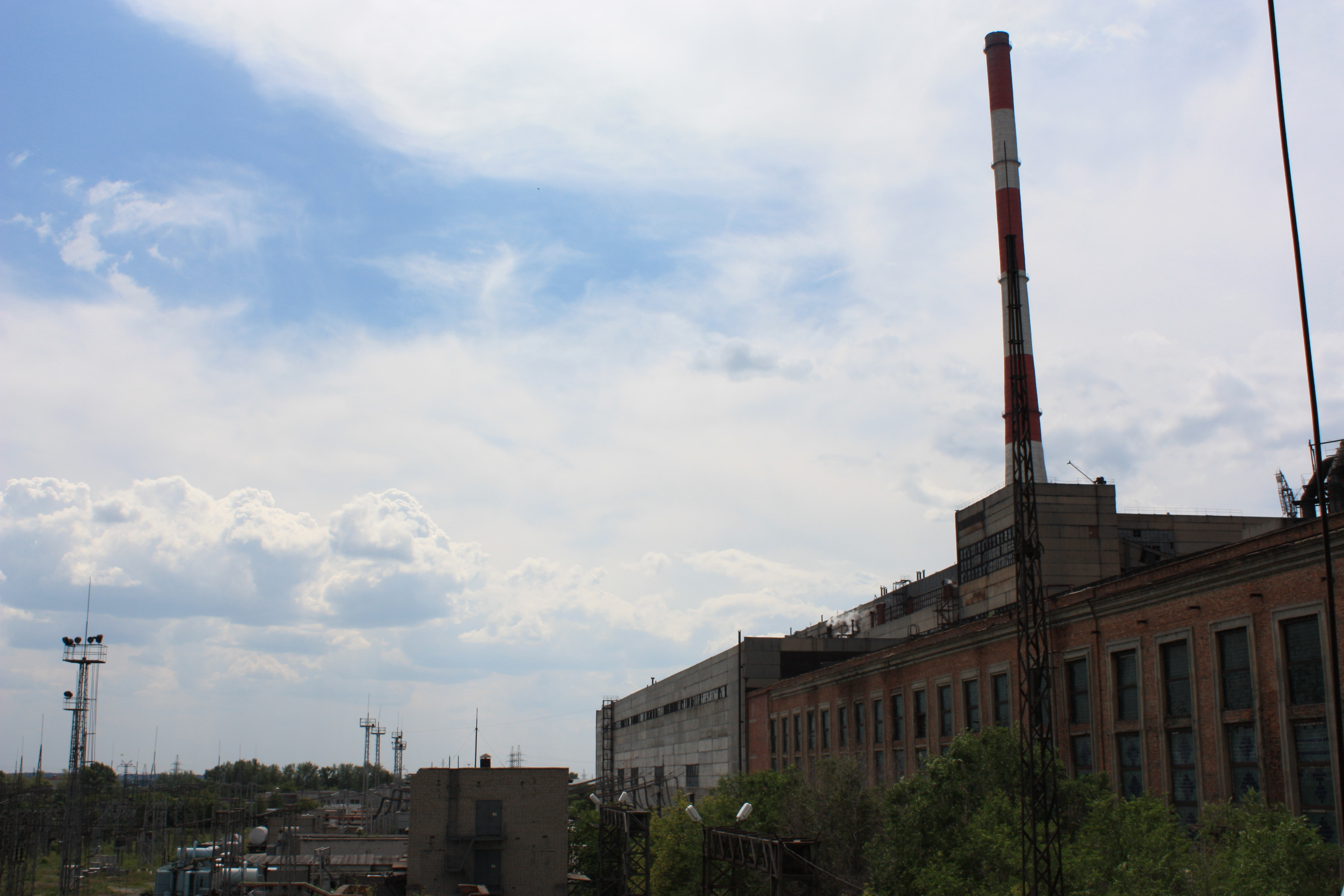 rayon Energetiki, Kurgan, Kurganskaya oblast', Russia, 640008